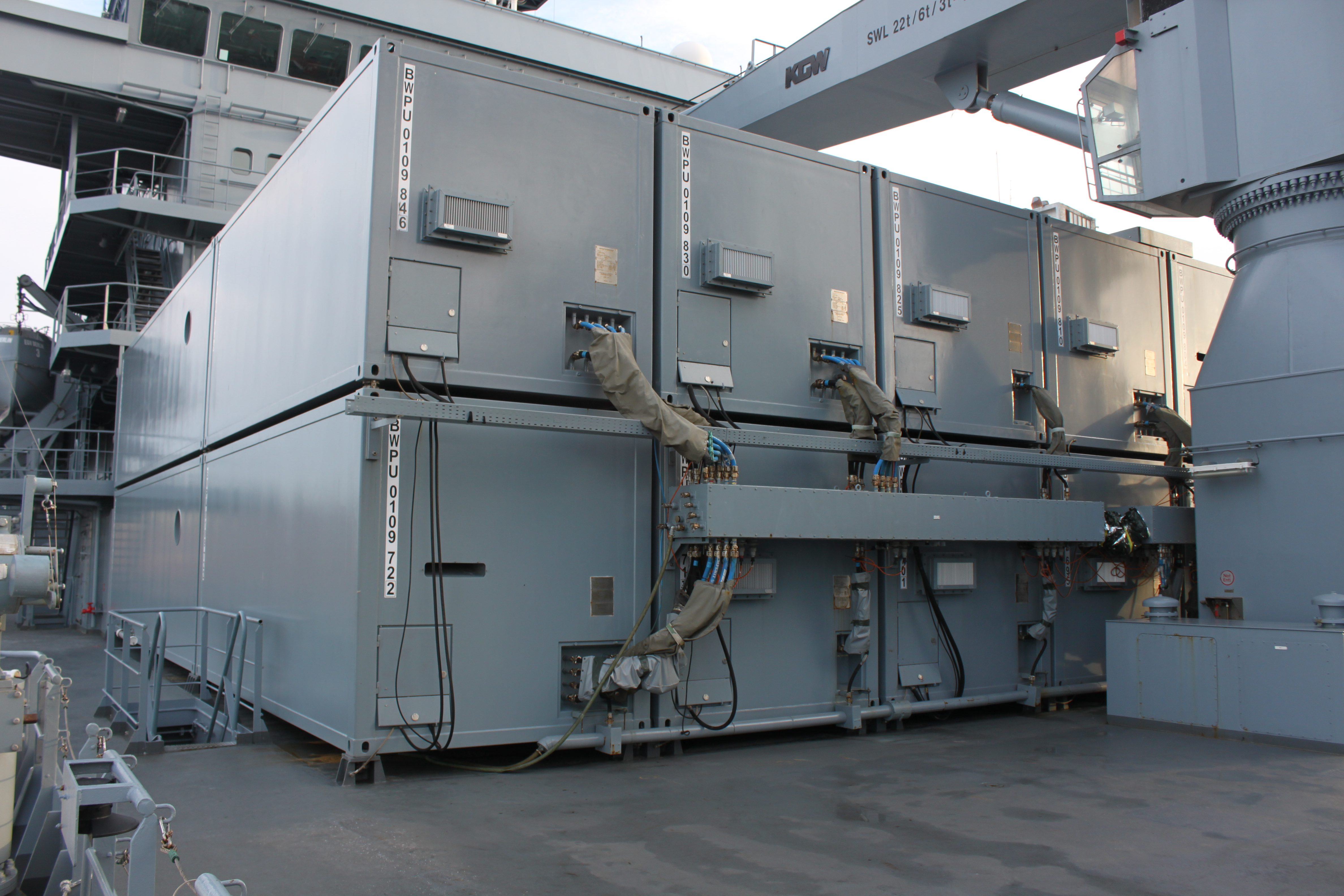 EGV Berlin - A1411 visiting Copenhagen, docked at Frihavnen.